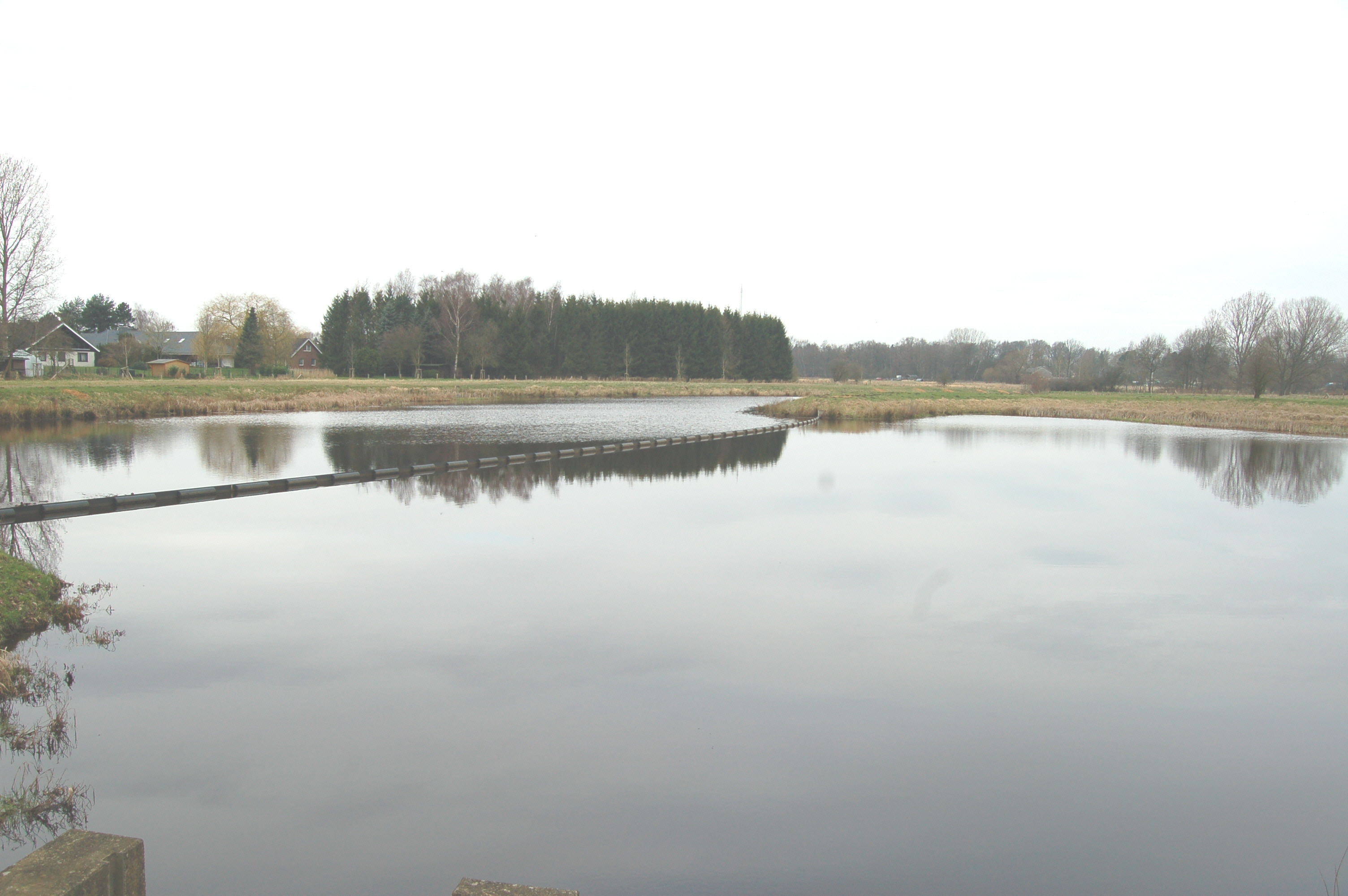 Das Regenrückhaltebecken des Ohrtbrookgraben. Der Ohrtbrookgraben ist ein rechter Nebenfluss der Pinnau und bildet die Grenze zwischen den beiden Städten Uetersen und Tornesch.